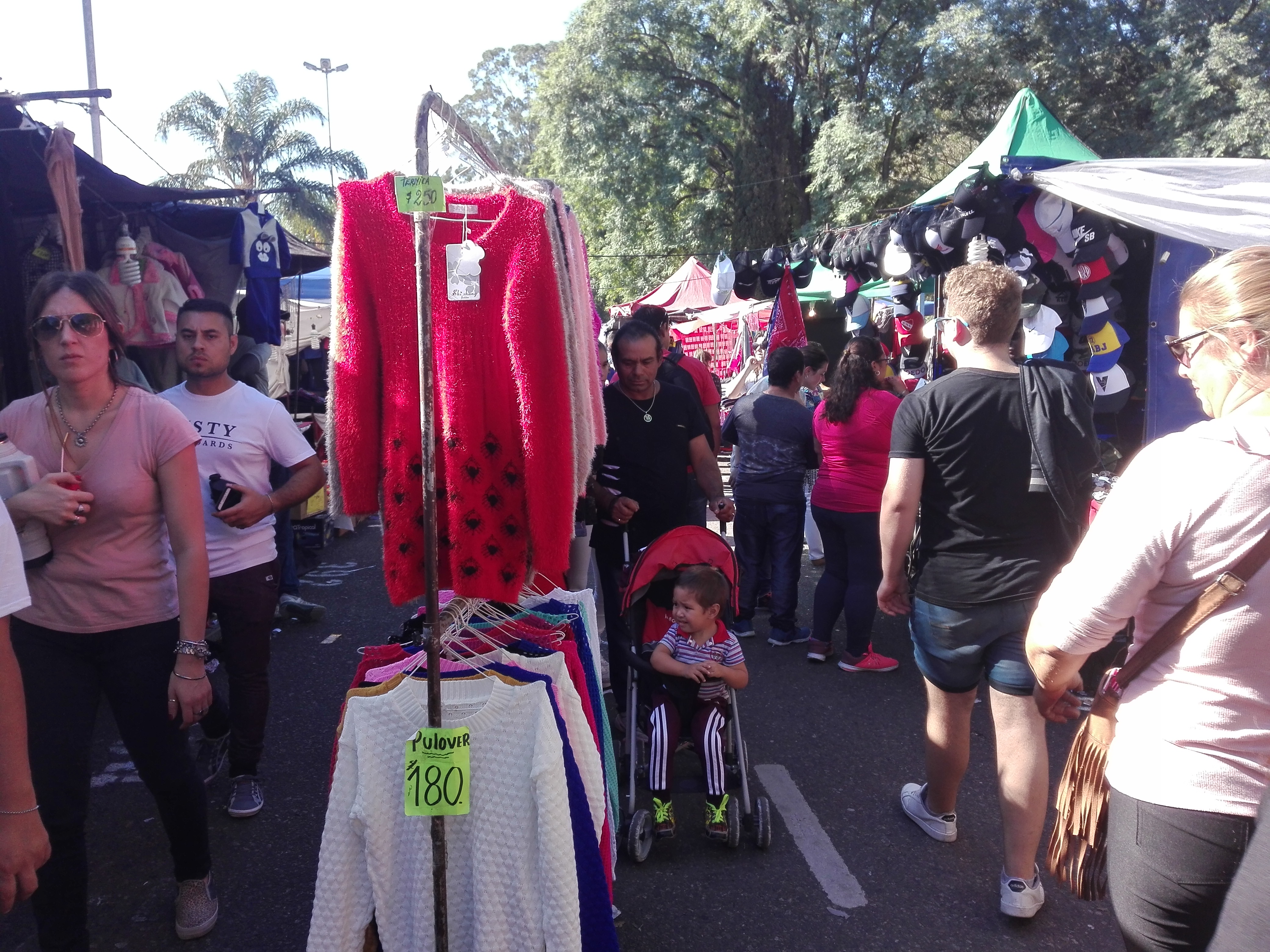 Feria en la 119ª Fiesta de la Virgen de Guadalupe.